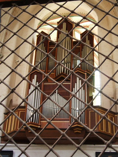 Schuke Orgel in der St.-Nikolai-Kirche, Stralsund